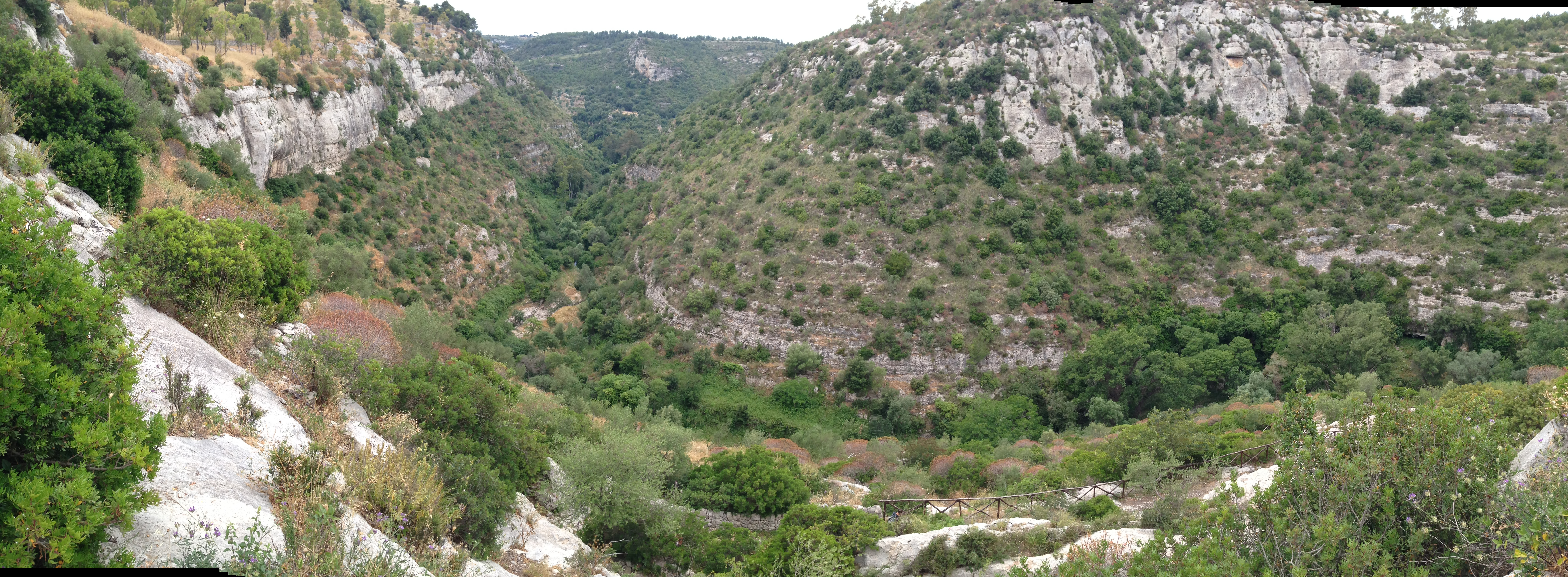 Cava Carosello, panorama